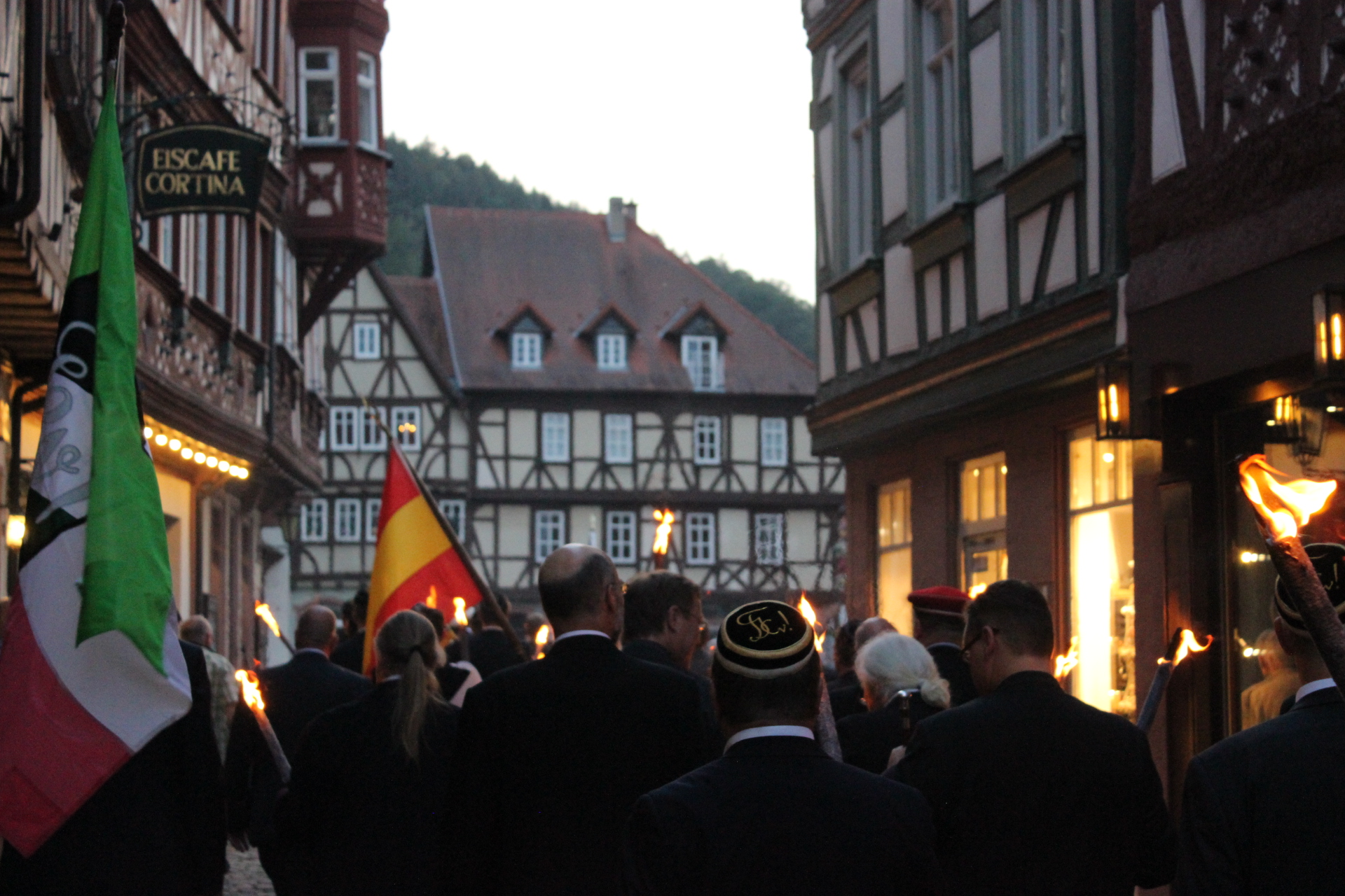 Fackelzug der MR-Verbindungen vom Alten Rathaus zum Alten Marktplatz zur 100. MR-Tagung